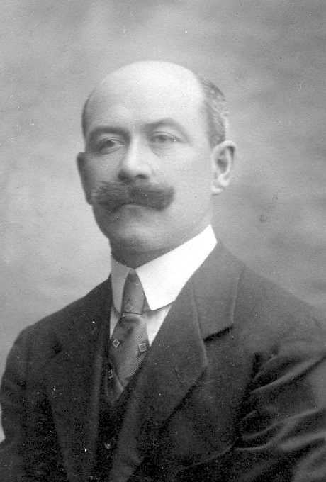 Louis BRASSART-MARIAGE (1875-1933) Source : photo de famille